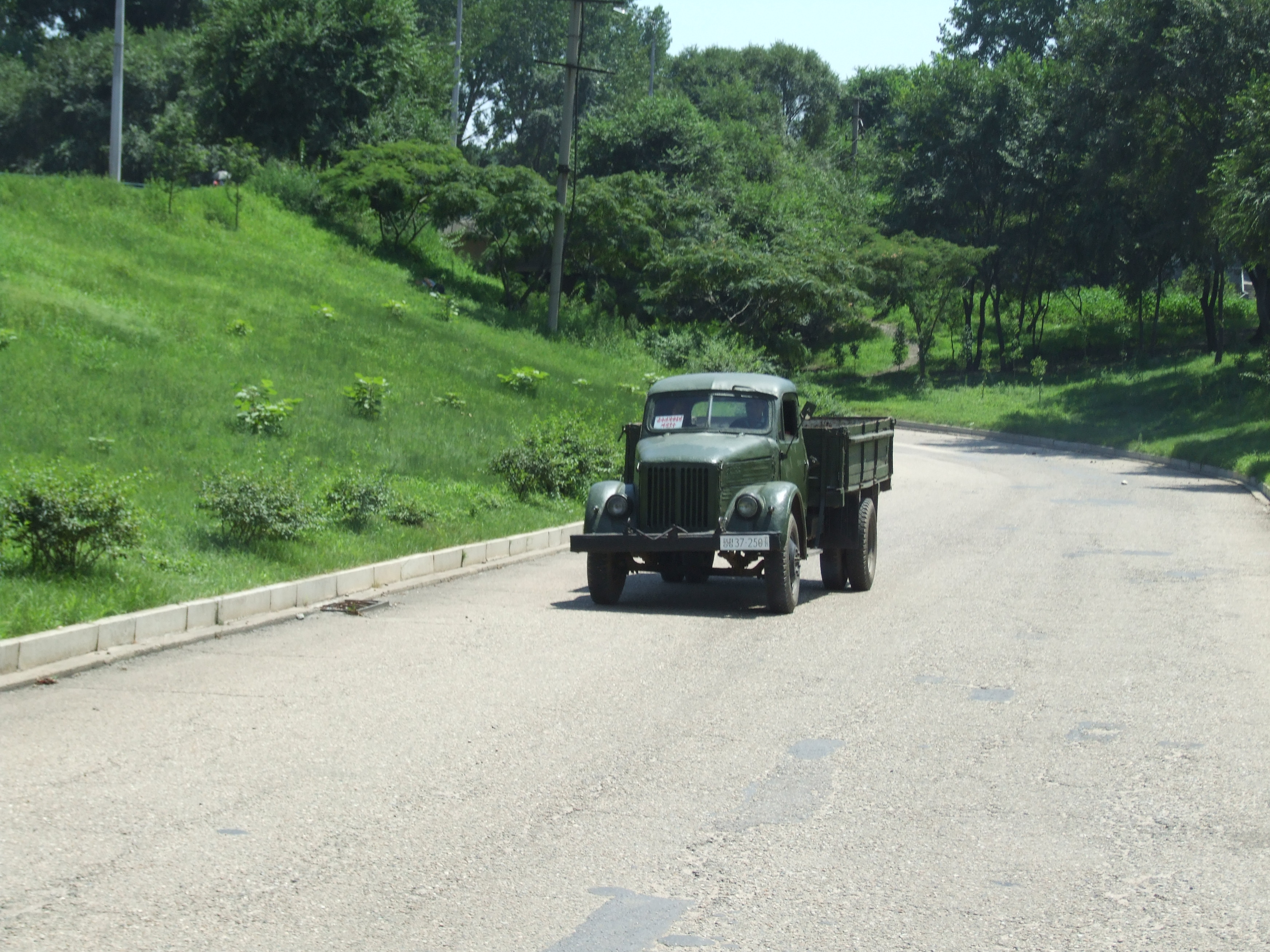 Verkehr in Pjöngjang